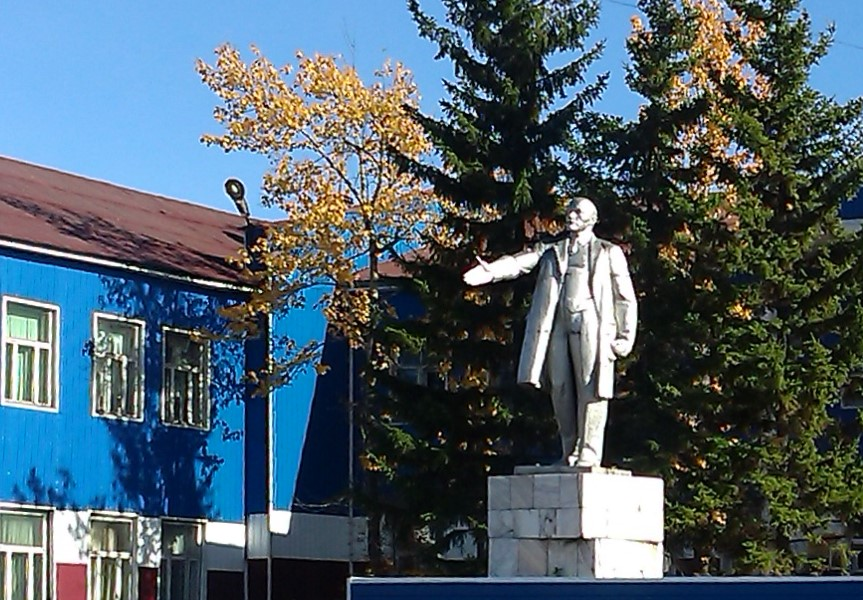 Памятник В.И. Ленину в поселке Хандыга, Томпонский район, республика Саха (Якутия)